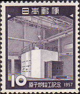 日本で最初の研究用原子炉JRR-1竣工を記念して発行された記念切手